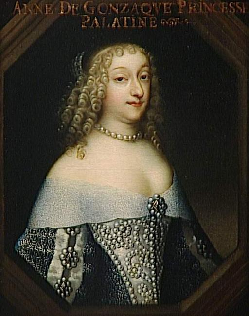 Die französische Adlie Anna Gonzaga (1616-1684) war Gemahlin von Eduard von der Pfalz.